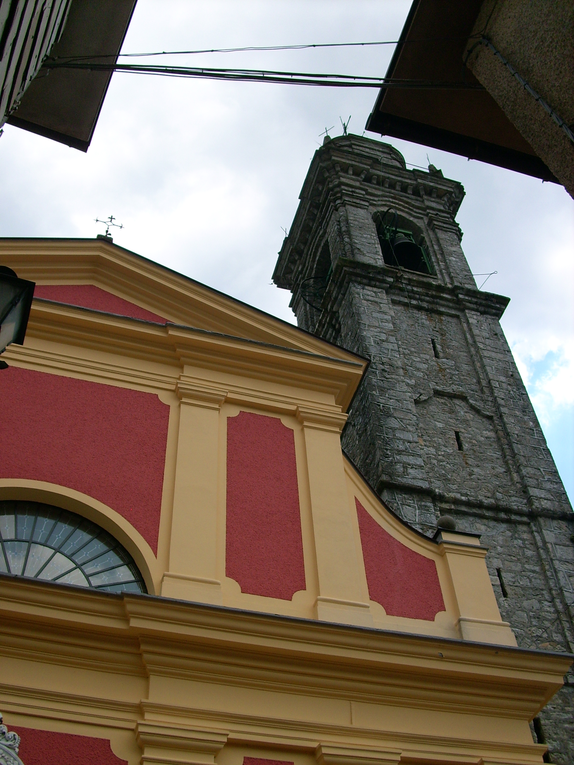 Chiesa di Cabanne, Rezzoaglio, Liguria, Italia